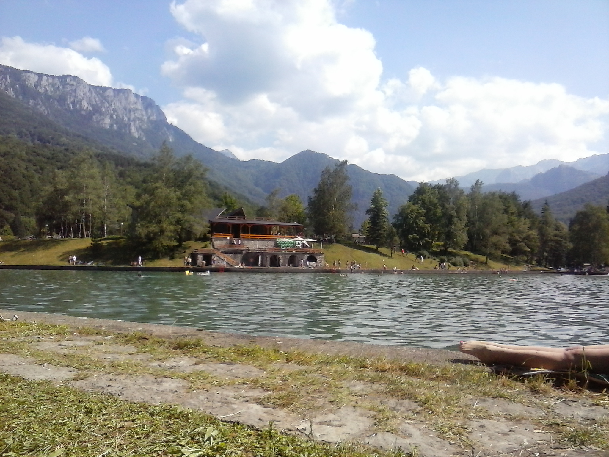 Сликава е подигната во рамките на проектот „По трагата на душата 2015“.